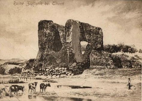 Zamek w Złotorii na międzywojennej pocztówce.